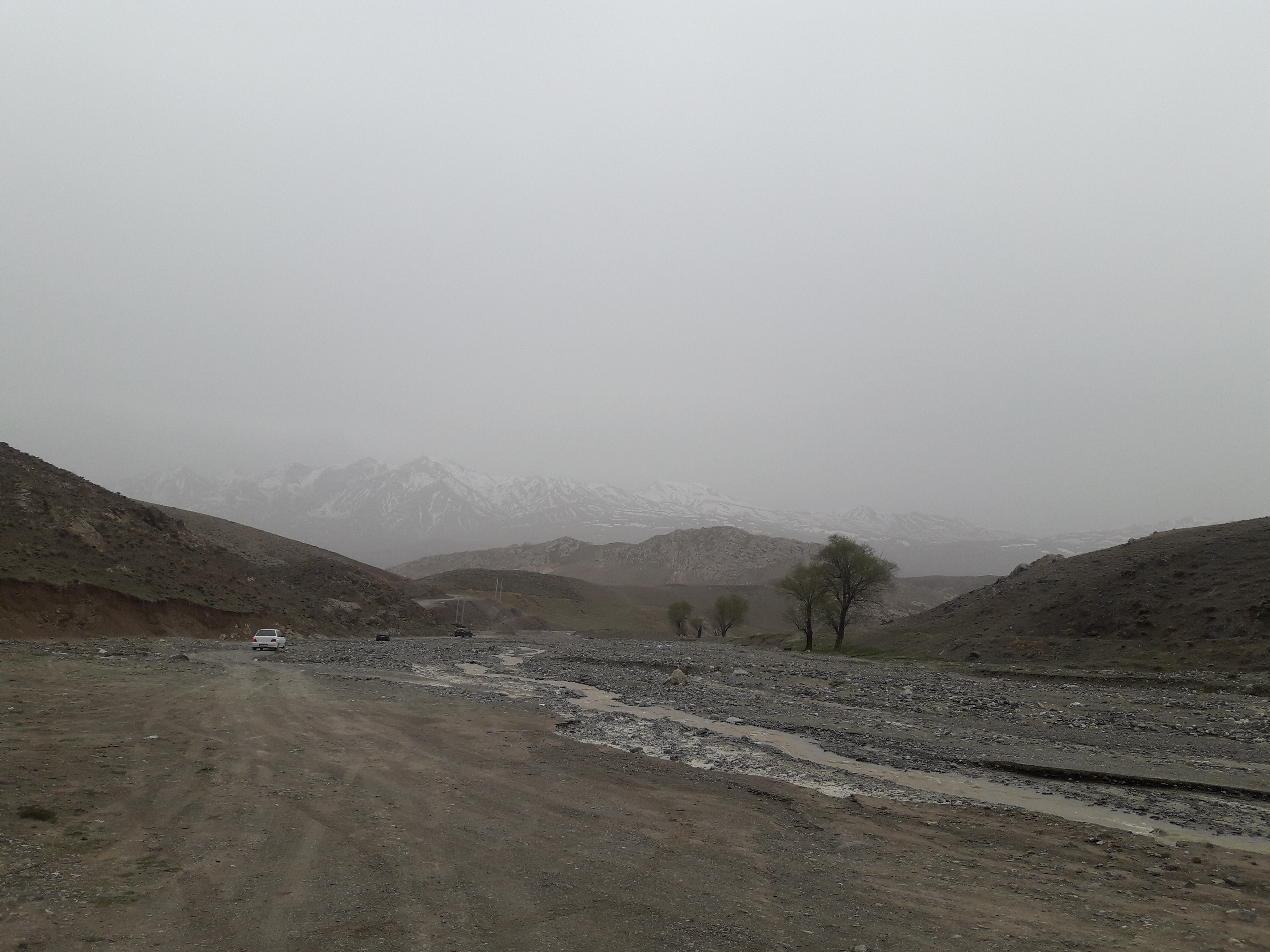 در فصل بارندگی و سیل مواظب باشین ماشیناتون رو کجا قرار میدین البته خیلی وقت هست که بارش شدیدی صورت نگرفته در این محل اما شما حتما در مسیر سیل پار نکنید